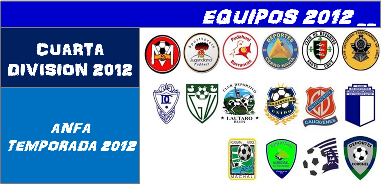 Tercera B